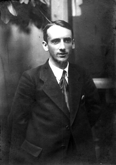 Лапчинський Георгій Федорович